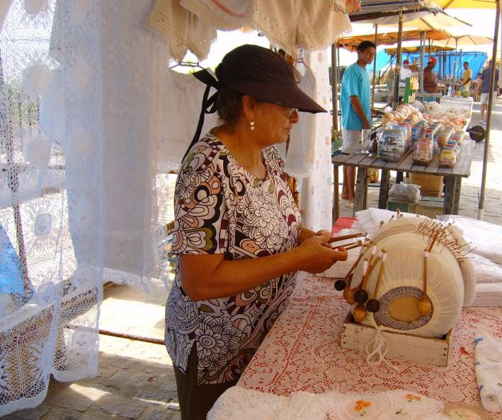 Rendeira cearense trabalhando com bilro, foto de minha autoria (luferom), tomada em agosto de 2006, na Praia de Morro Branco, Ceará, Brasil